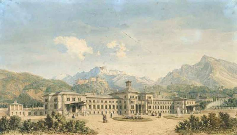 er Salzburger Hauptbahnhof (Aquarell von Franz Heinrich), um 1870 Salzburg Museum, Inv.-Nr. 18/54